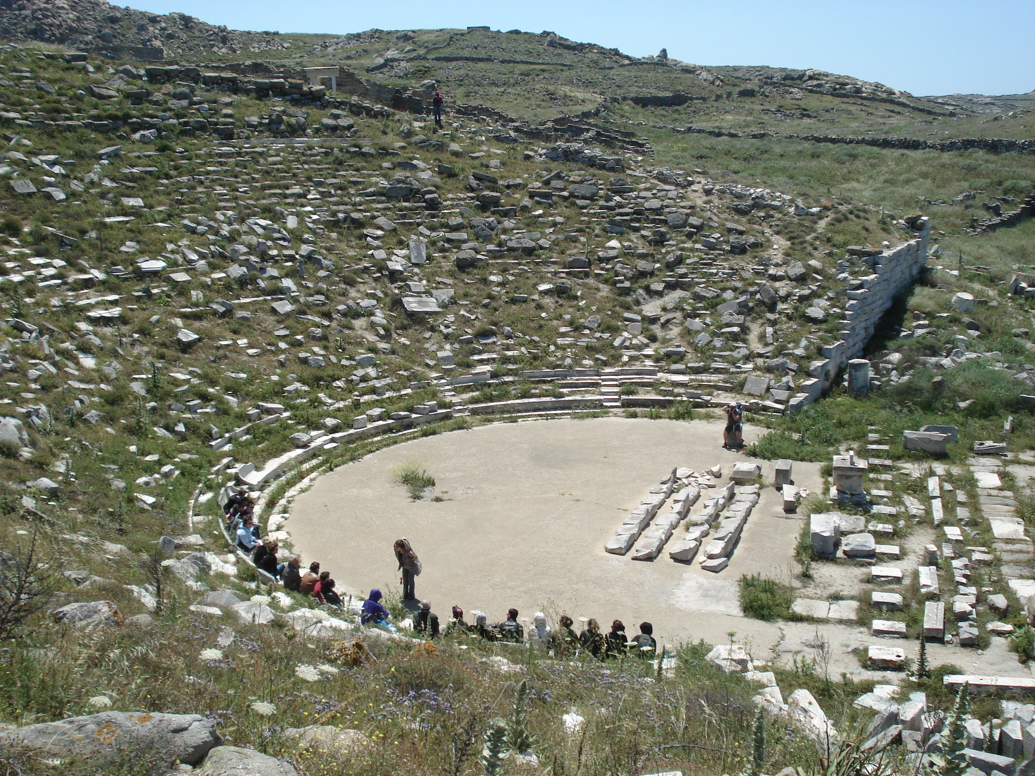 Anfi-teatro na ilha museu de Delos, Grécia.